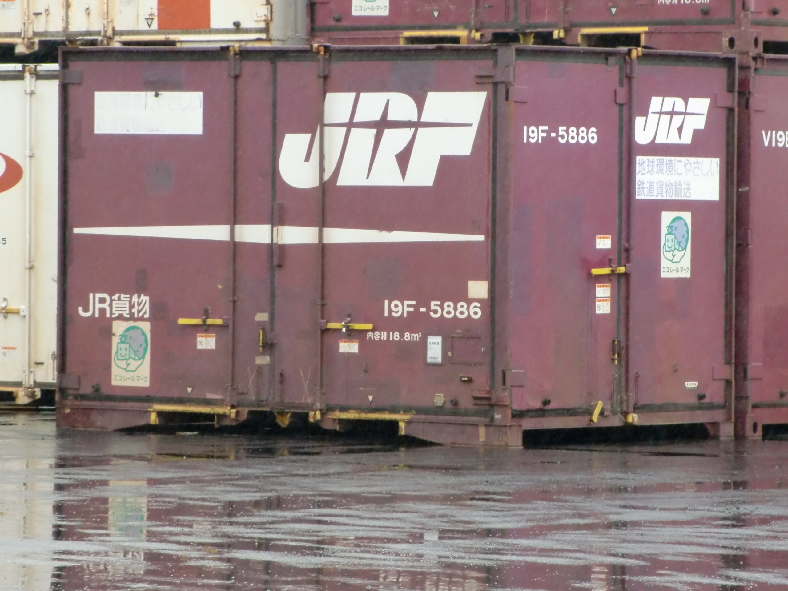 撮影地＝【埼玉／羽生ORS】